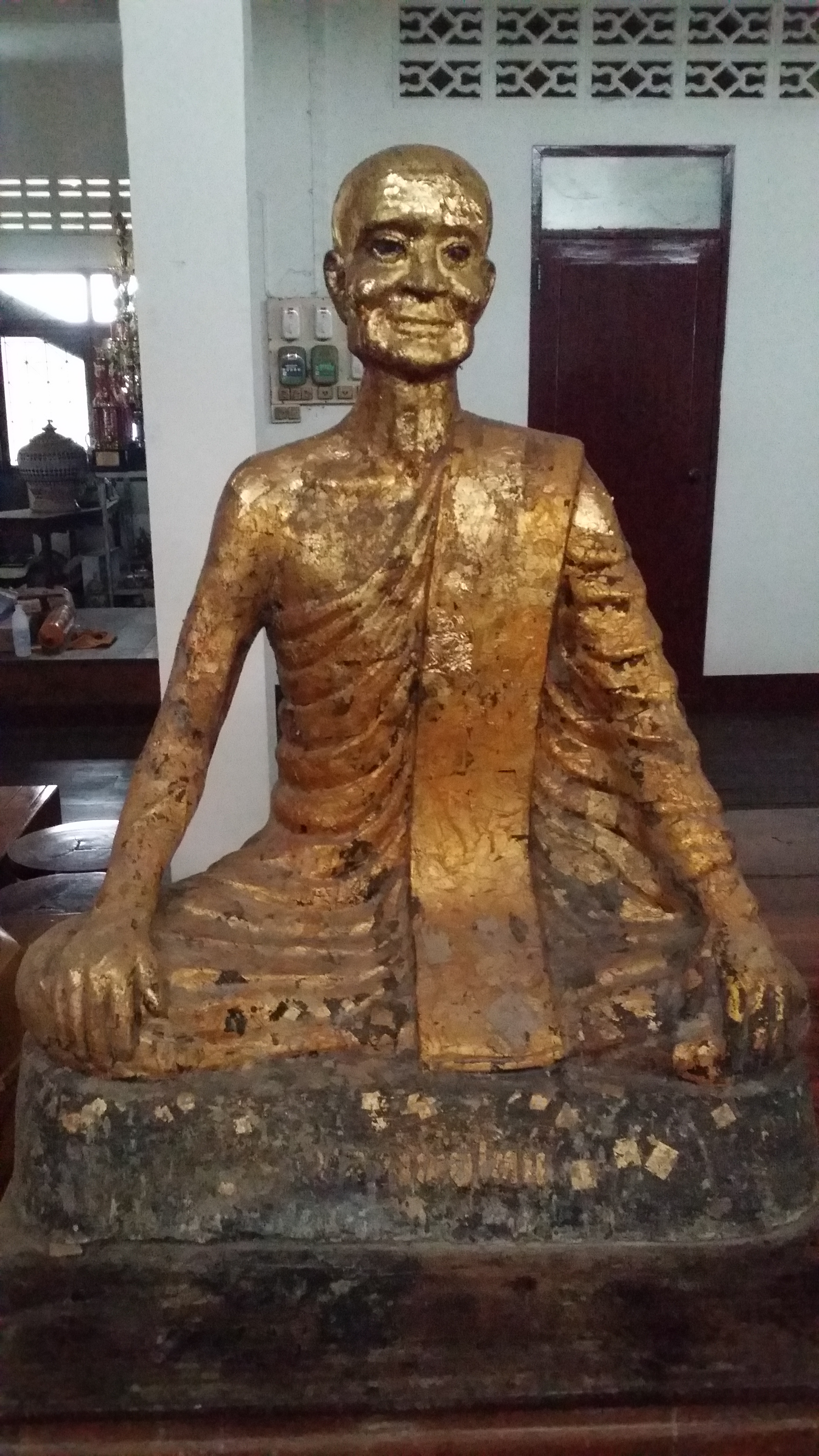 อดีตเจ้าอาวาสวัดรางวาลย์